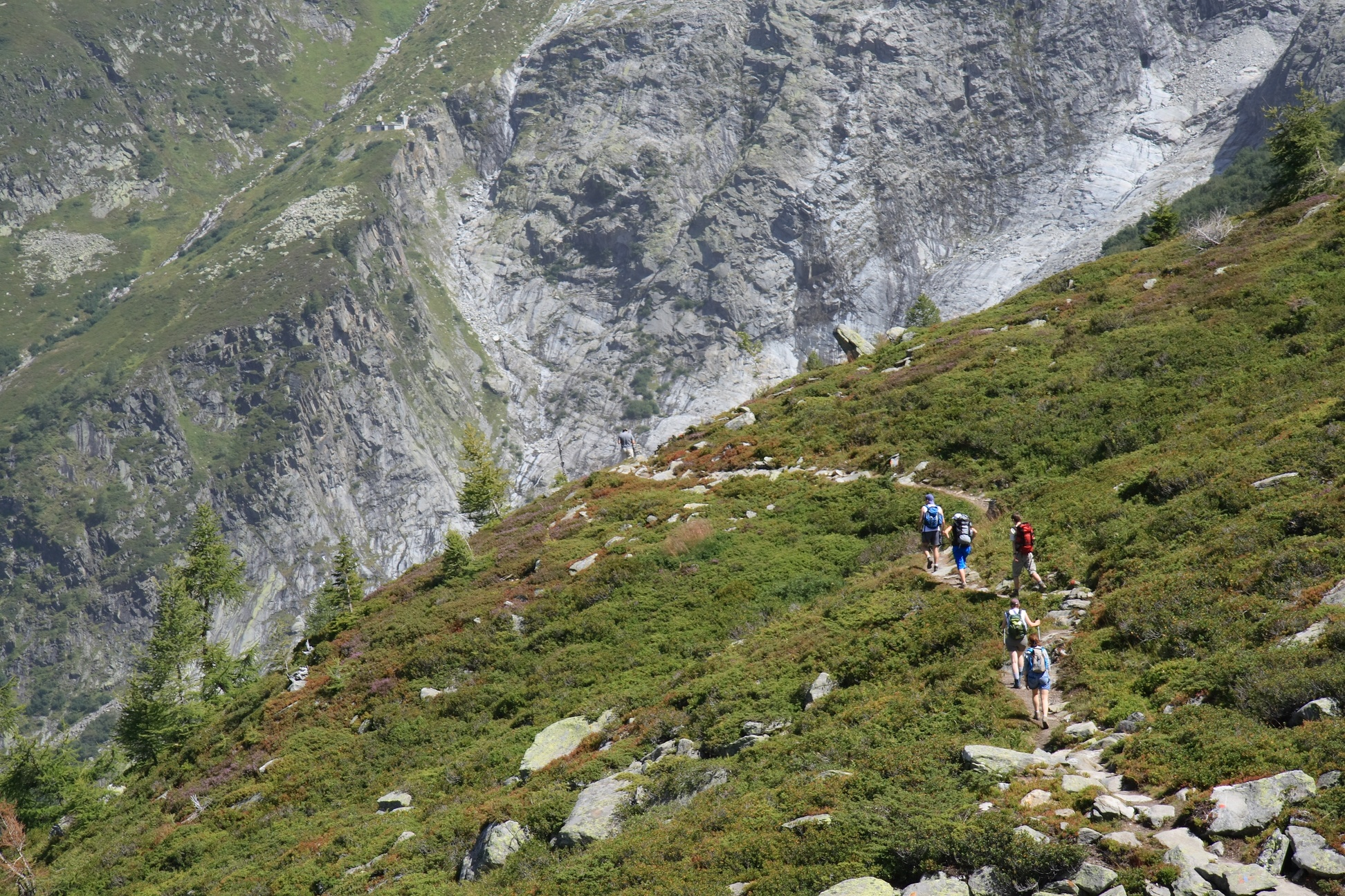 Des randonneurs, non loin du glacier du Tour